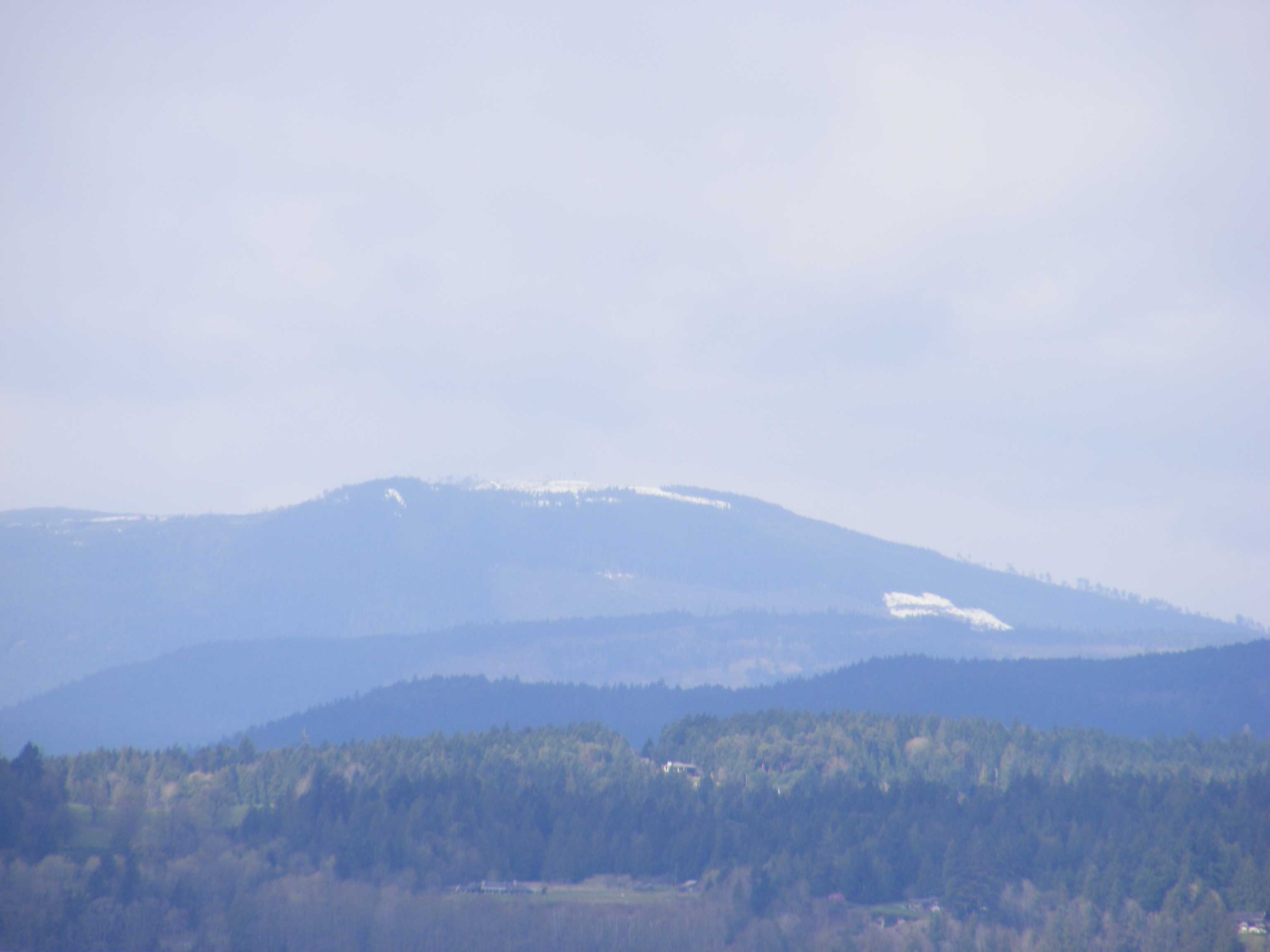 Koksilah Ridge